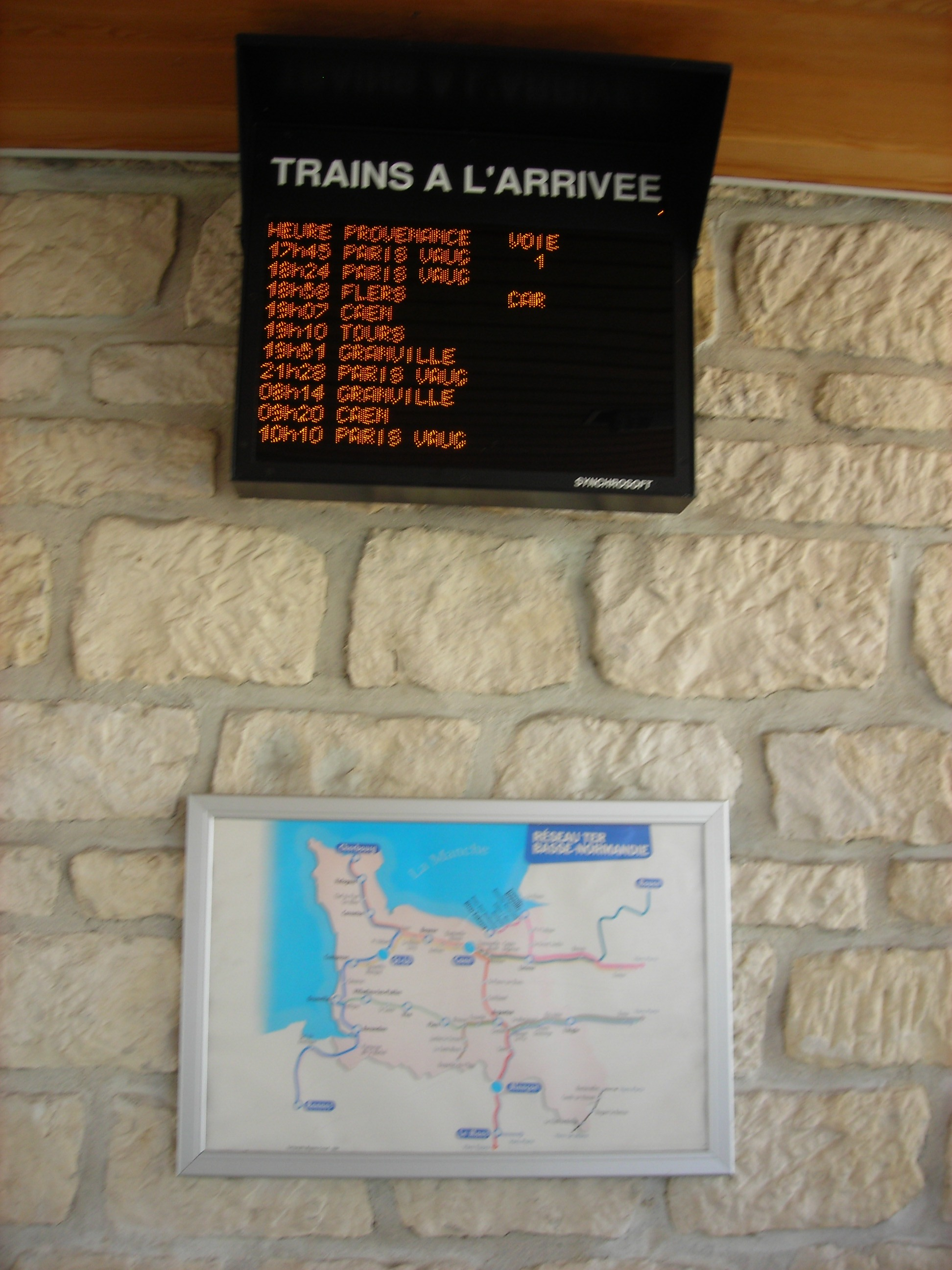 Panneau d'informations de la gare d'Argentant (Orne, France)